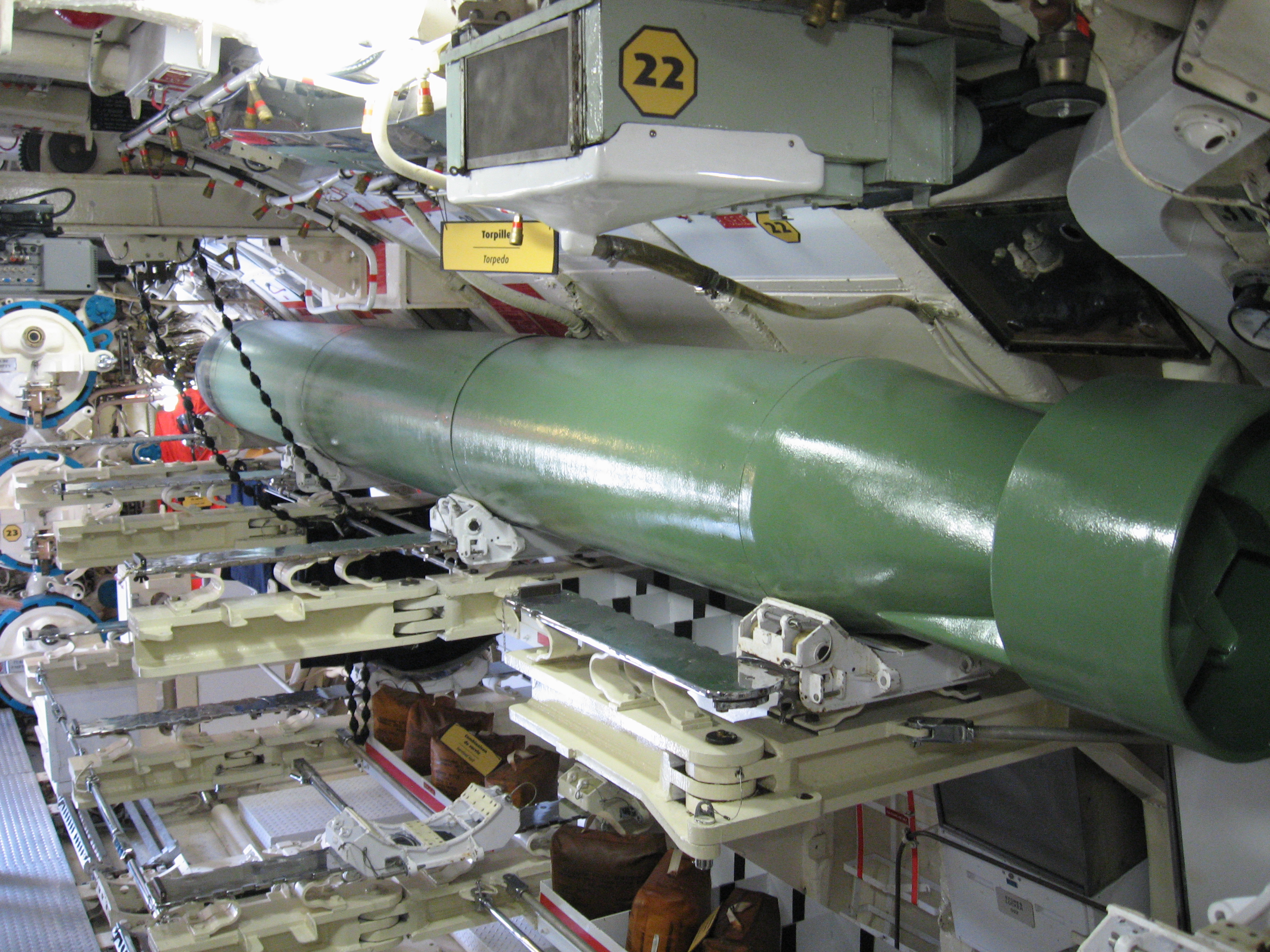 Rangement des torpilles dans la salle des torpilles du NCSM Onondaga